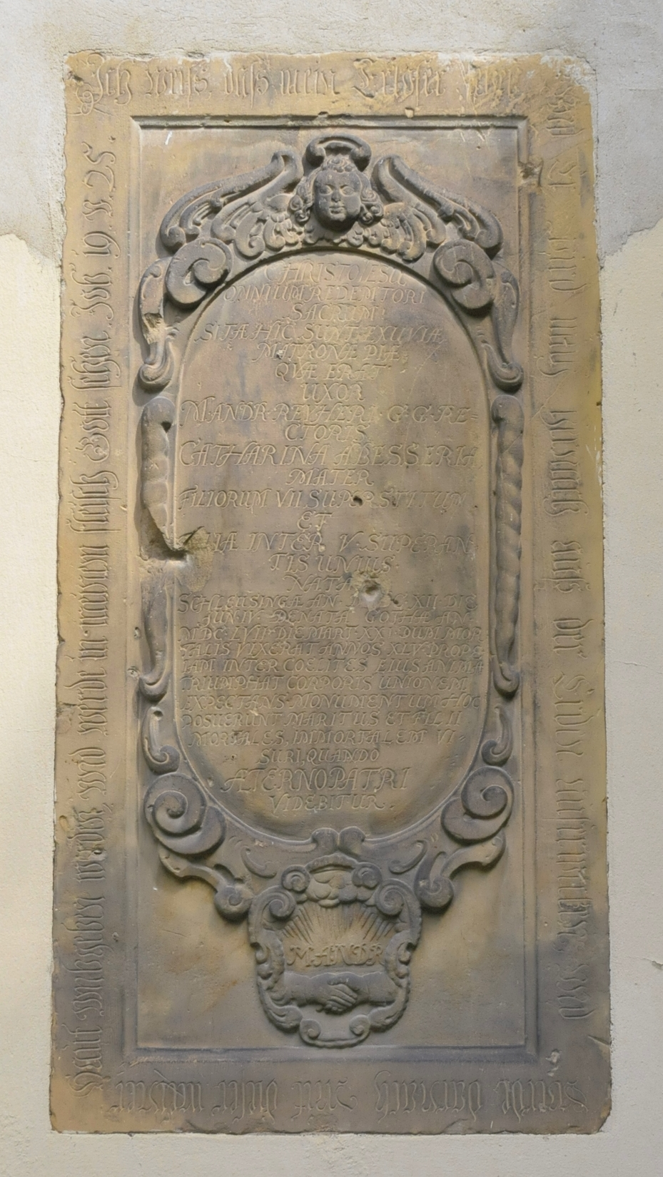 Grabplatte von Katharina Ambesser